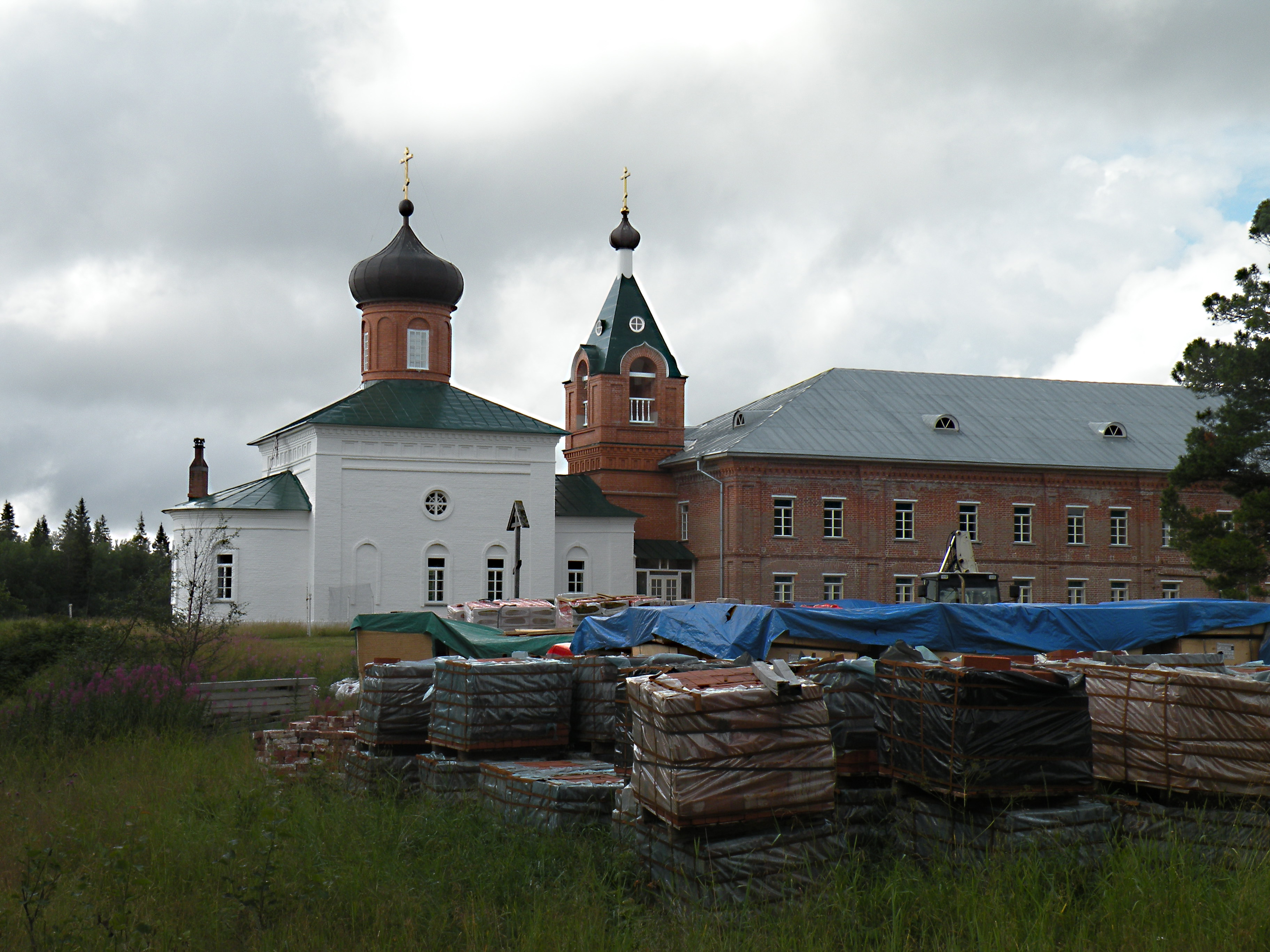 Большой Соловецкий остров. Савватиевский скит:Церковь в честь иконы Смоленской Божией Матери Одигитрии (Шахларев 1860) и келейный корпус (1863)